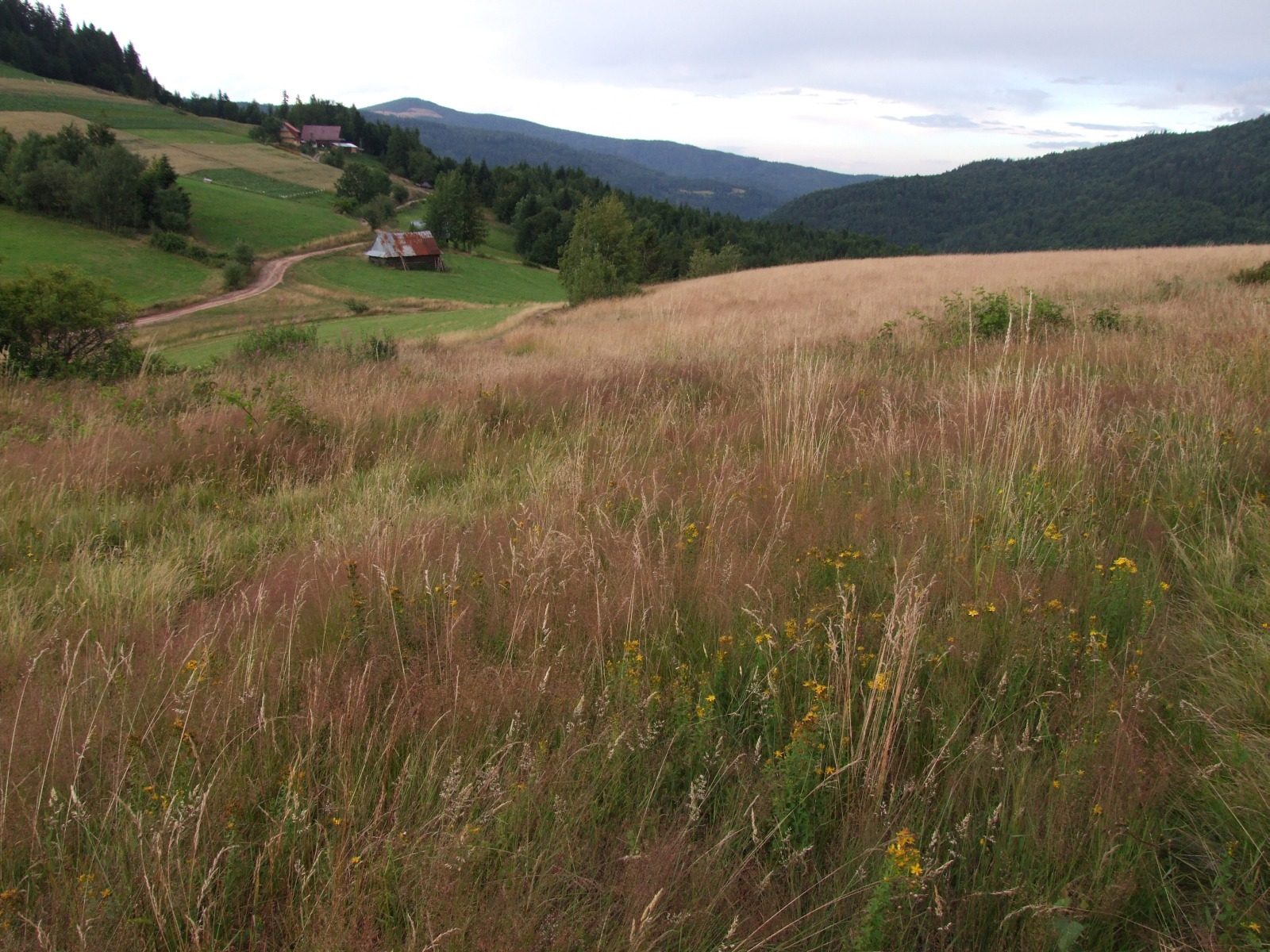 Przełęcz Przysłopek w Beskidzie Wyspowym. W głębi Mogielica